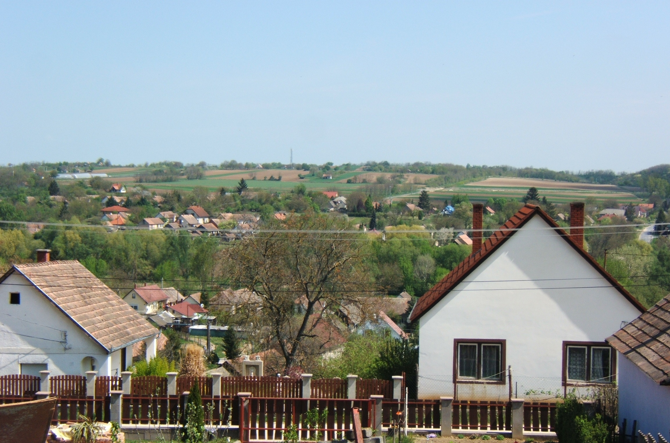 Balatonendréd látképe